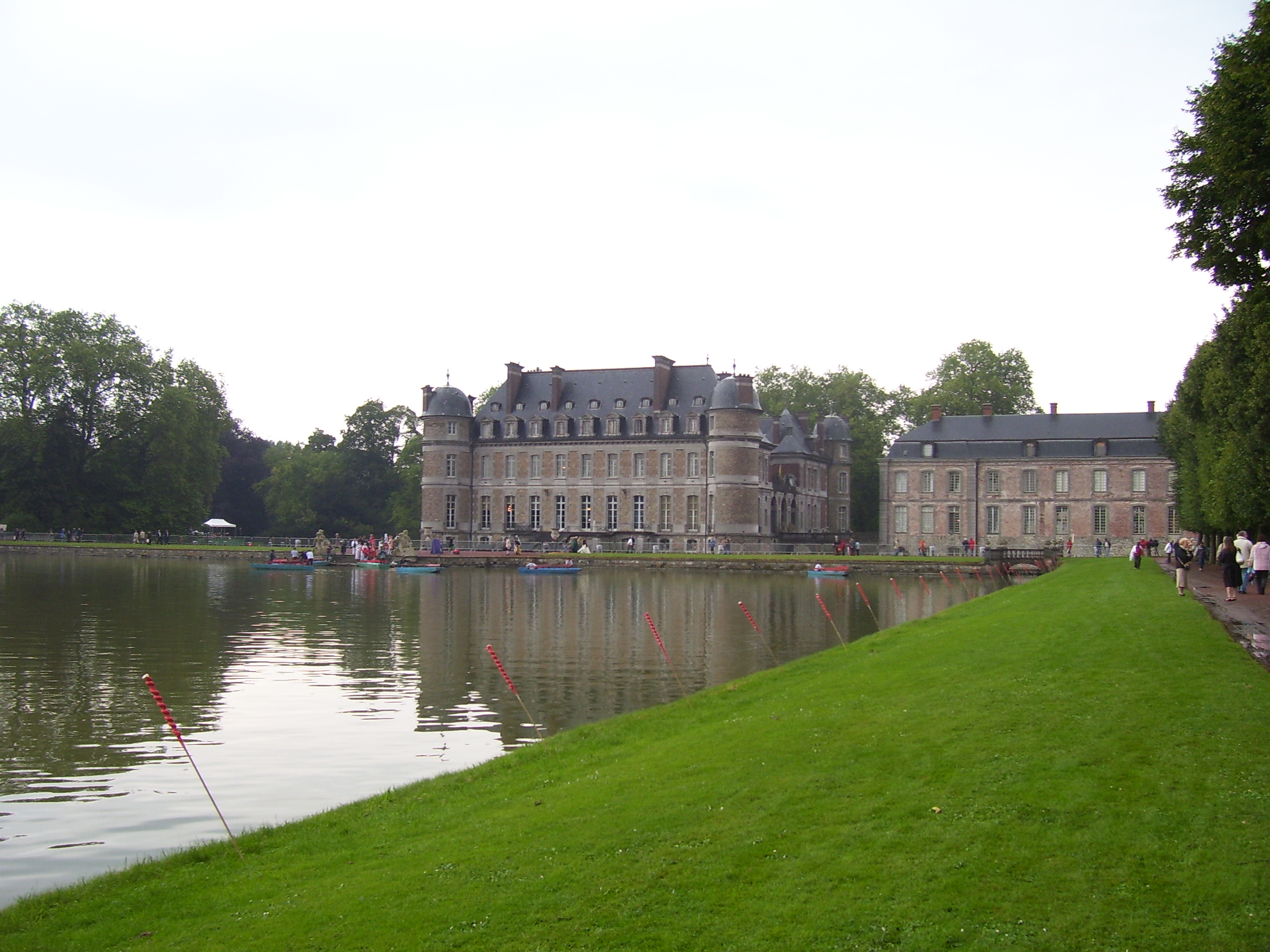 Schloss Belœil in Belgien / Belœil Castle in Belgium